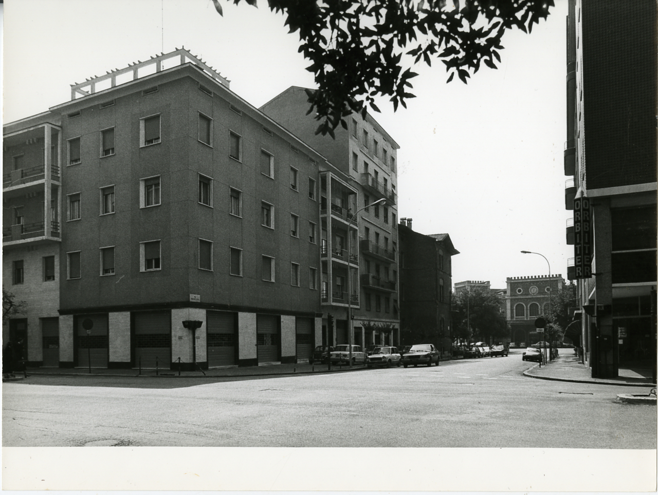 Servizio fotografico : Brescia, 1981 / Paolo Monti. - Stampe: 2 : Positivo b/n, gelatina bromuro d'argento/ carta, 18x24. - ((Sul coperchio della scatola manoscritto a pennarello nero: "Brescia"